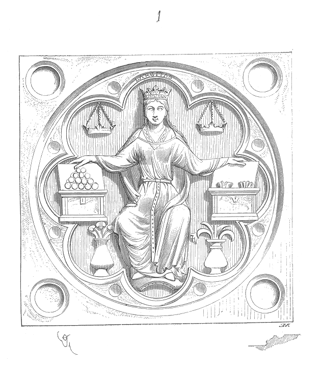 ... C'est seulement vers la fin du XIIe siècle, ainsi que nous le disions, qu'apparaissent, sur nos monuments, ces représentations des Vertus, et, parmi ces sculptures, on peut citer comme des plus anciennes celles qui décorent les soubassements de la porte de gauche de la façade de la cathédrale de Sens. Elles montrent la Largesse, et en regard l'Avarice. La Largesse (fig. 1) est une femme drapée, couronnée, assise. De ses deux mains, elle ouvre deux coffres remplis de sacs et d'écus. Deux lampes en forme de couronne sont suspendues à ses côtés; à ses pieds sont deux vases de fleurs ...